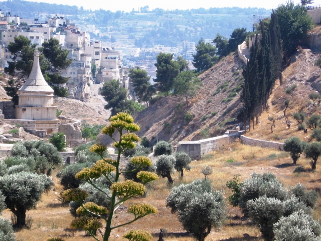 יד אבשלום מעל נחל קידרון שבעמק יהושפט, במבט מהצפון; מימין עולה דרך האופל ומשמאל ראוים את כפר שילוח. ברקע שכונת אבו טור ומעליה יער השלום והטיילת ארמון הנציב. Tomb of Absalom above Wadi Kidron in the valley of Yehoshafat; ןn this view from North we see the Ophel road ascending to the Old City wall, to left the village of Silwan. In the backround is the neighborhood of Abu Tor, above which is the Peace Forest and the Haas Promenade on the Hill of Evil Council.